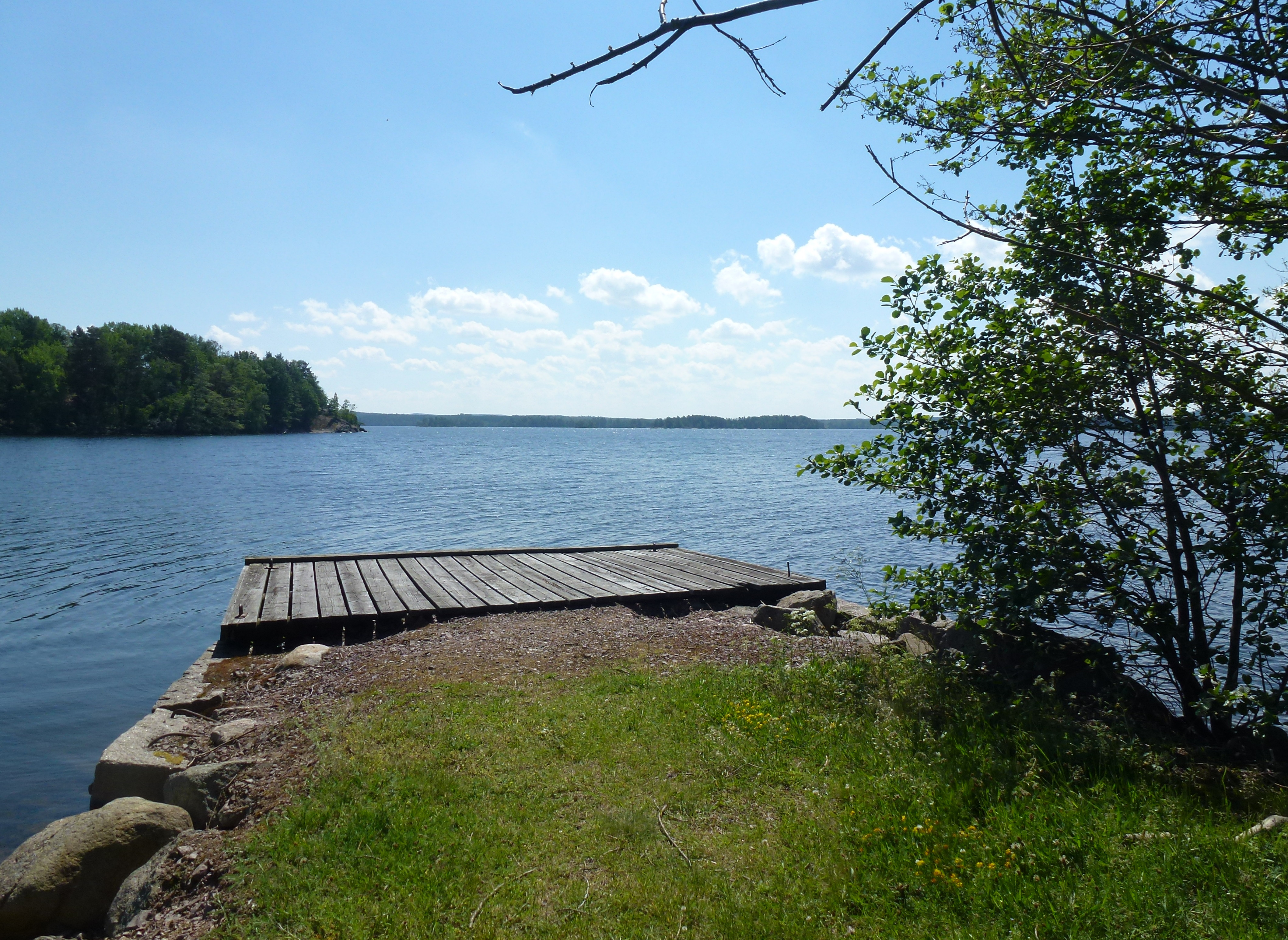 Sjön Åsunden Östergötland